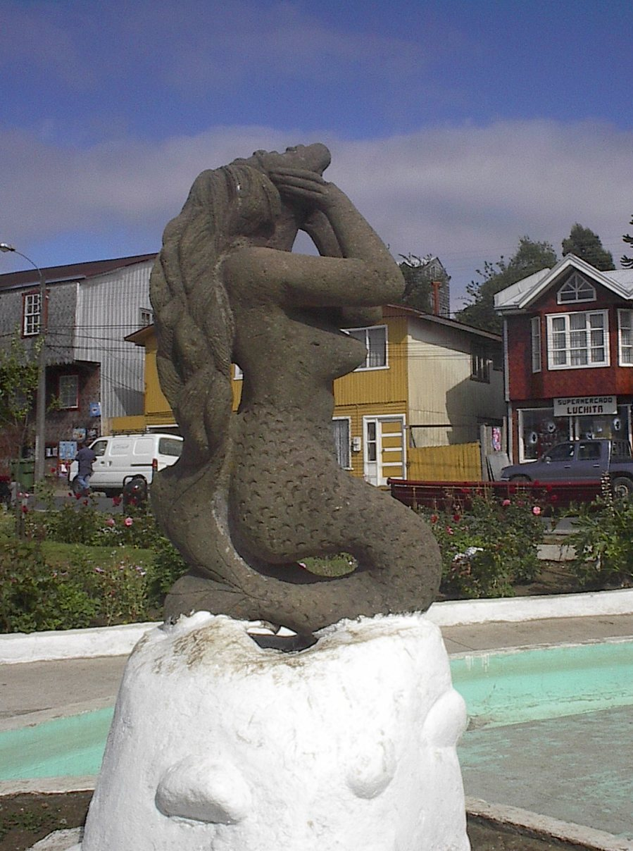 Escultura de una sirena, en la plaza de Chonchi, Chiloé (Chile)